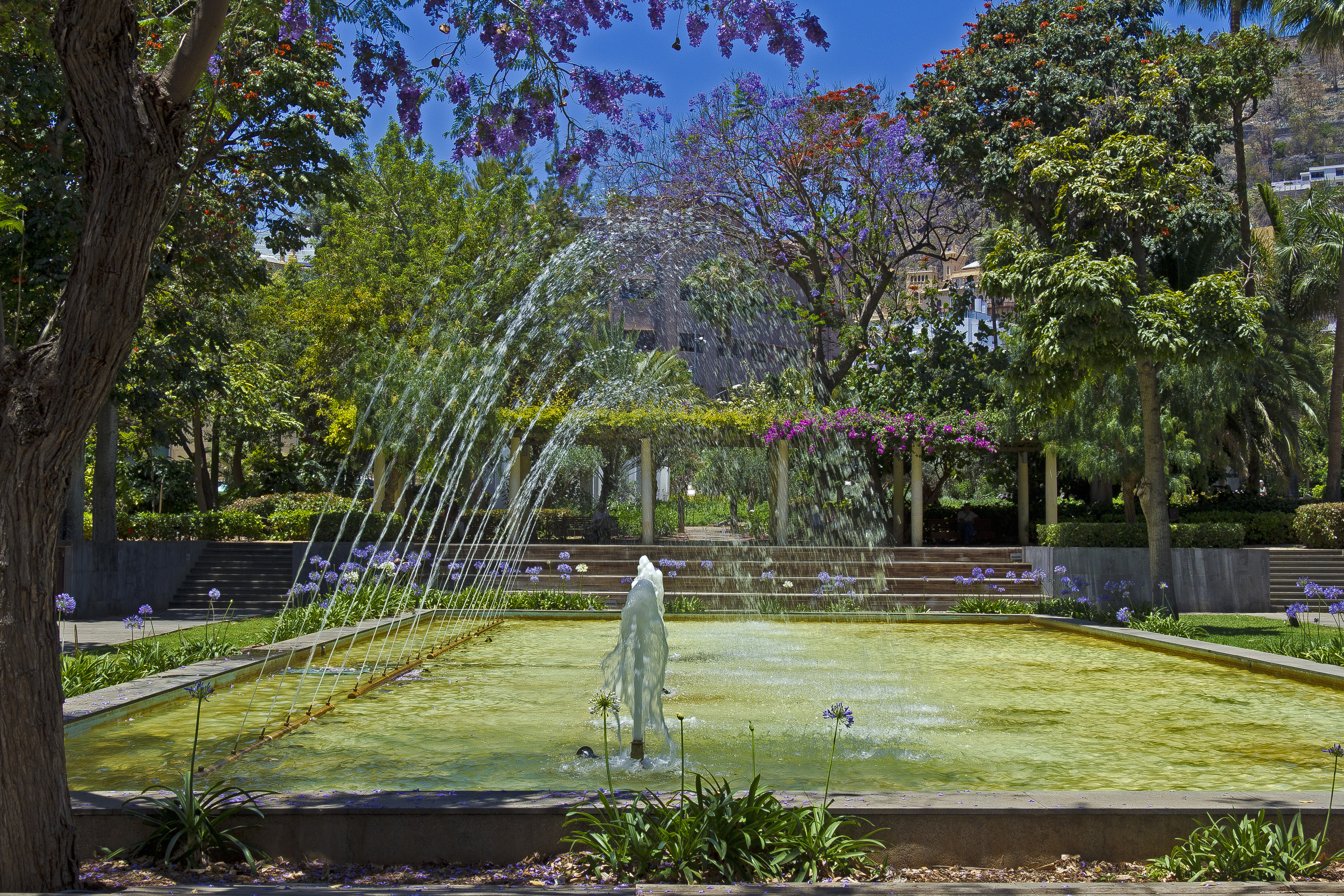 Einer der Springbrunnen im Parque García Sanabria in Santa Cruz de Tenerife